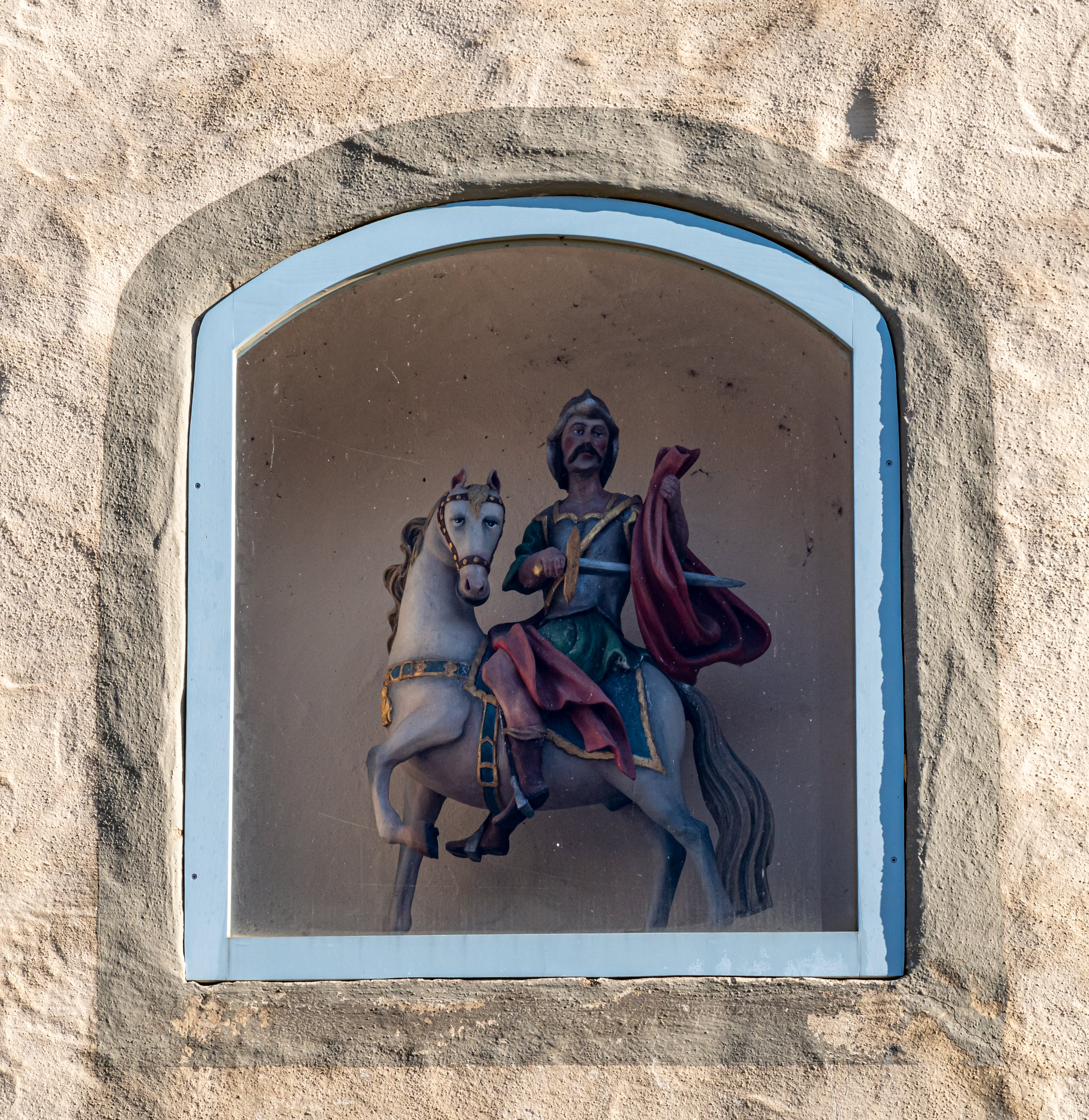 Bilder von St. Martin in Feldkirch